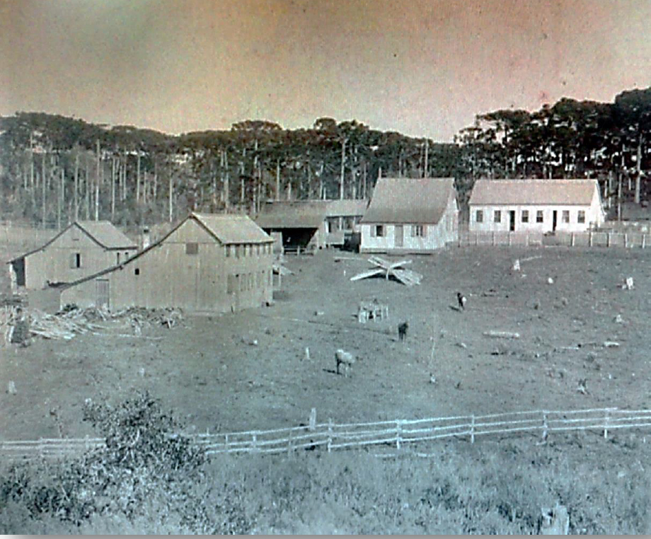 Primeiras casas do bairro São Pelegrino, pertencentes a Rafael Buratto e João Daniel von Schlabendorff